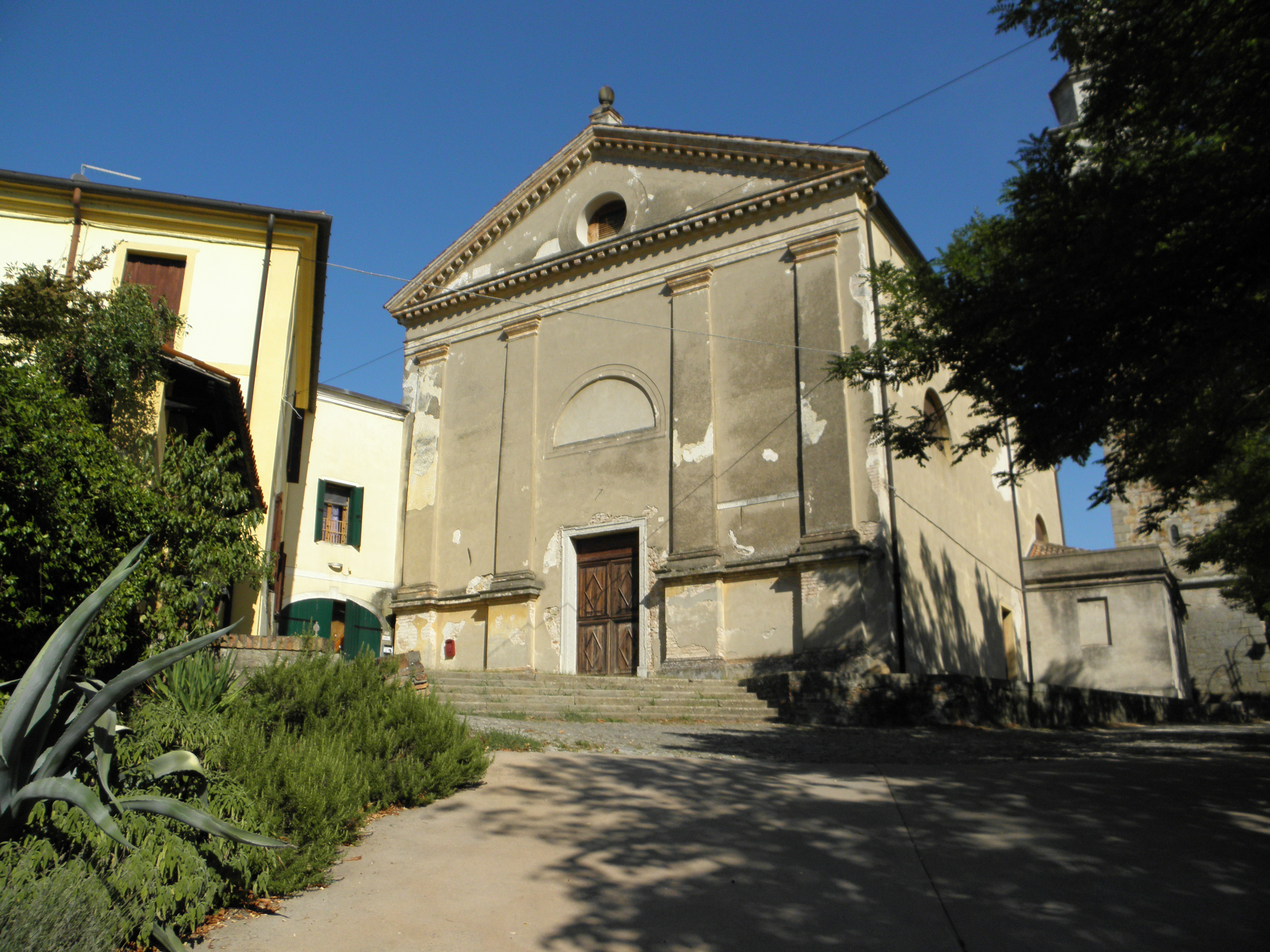 Galzignano Terme, l'antica chiesa di Santa Maria Assunta.